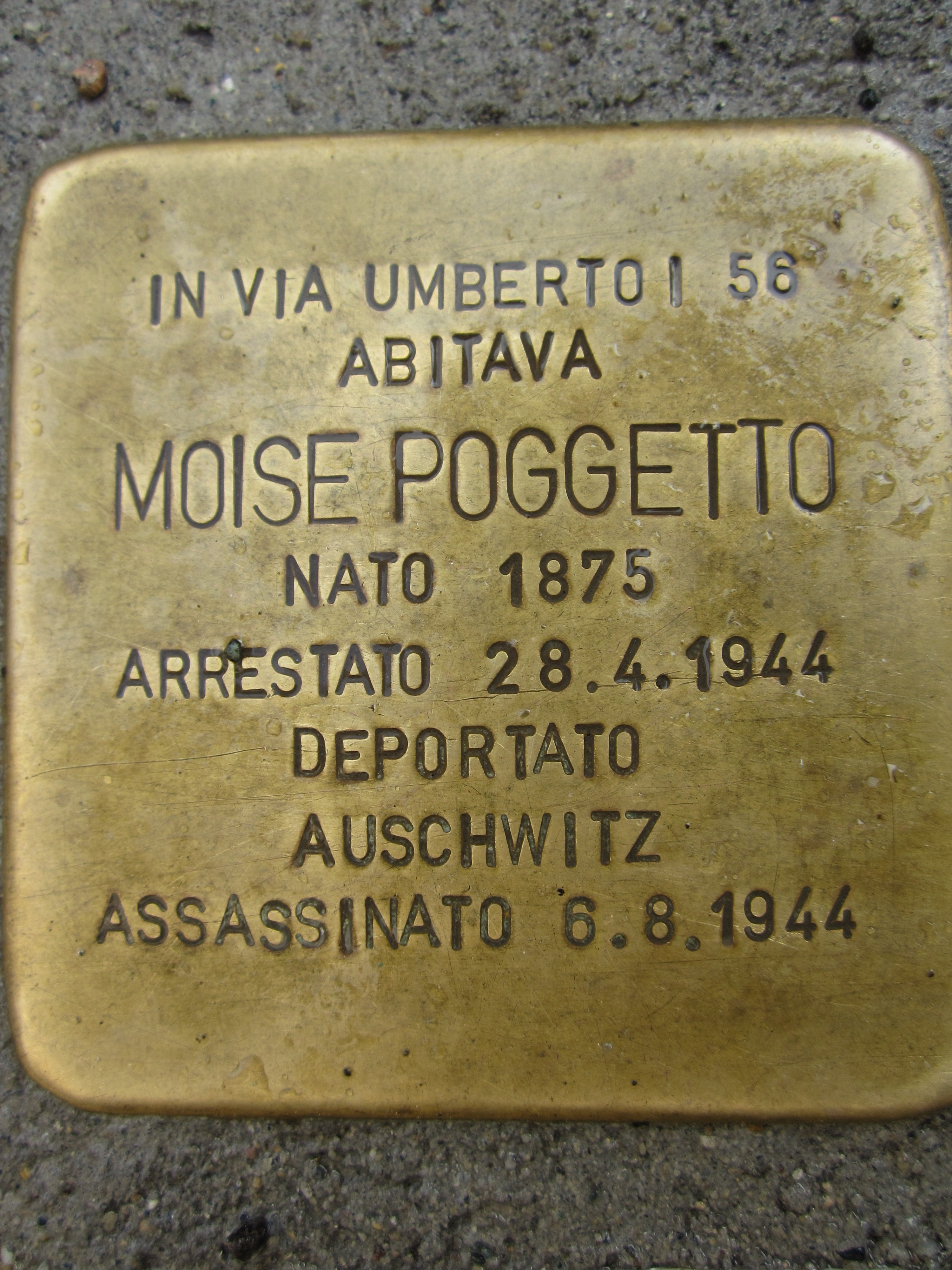 Pietra d'inciampo dedicata a Moise Poggetto posata il 17 gennaio 2018 in via Umberto I n.56 a Lanzo Torinese